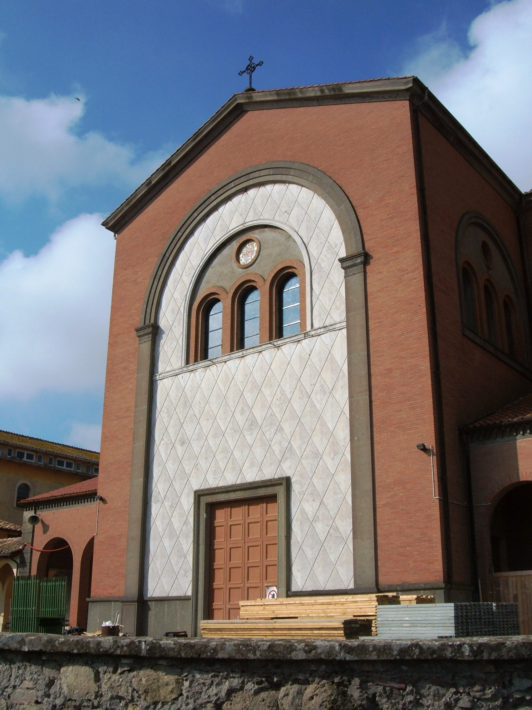 Cattedrale dei Sacri Cuori di Gesù e Maria, a Roma, in zona La Storta, sulla via Cassia. Chiesa cattedrale della diocesi suburbicaria di Porto-Santa Rufina.